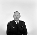 Motiv: Porträtt av överste Olle Knutsson, chef för Hälsinge flygflottilj (F 15) 1960-1965, Östgöta flygflottilj (F 3) 1965-1971. Tillhör Gamla Malmen-samlingen. GM 1201a-GM 1201c. Ur Flygvapenmuseums bildarkiv.